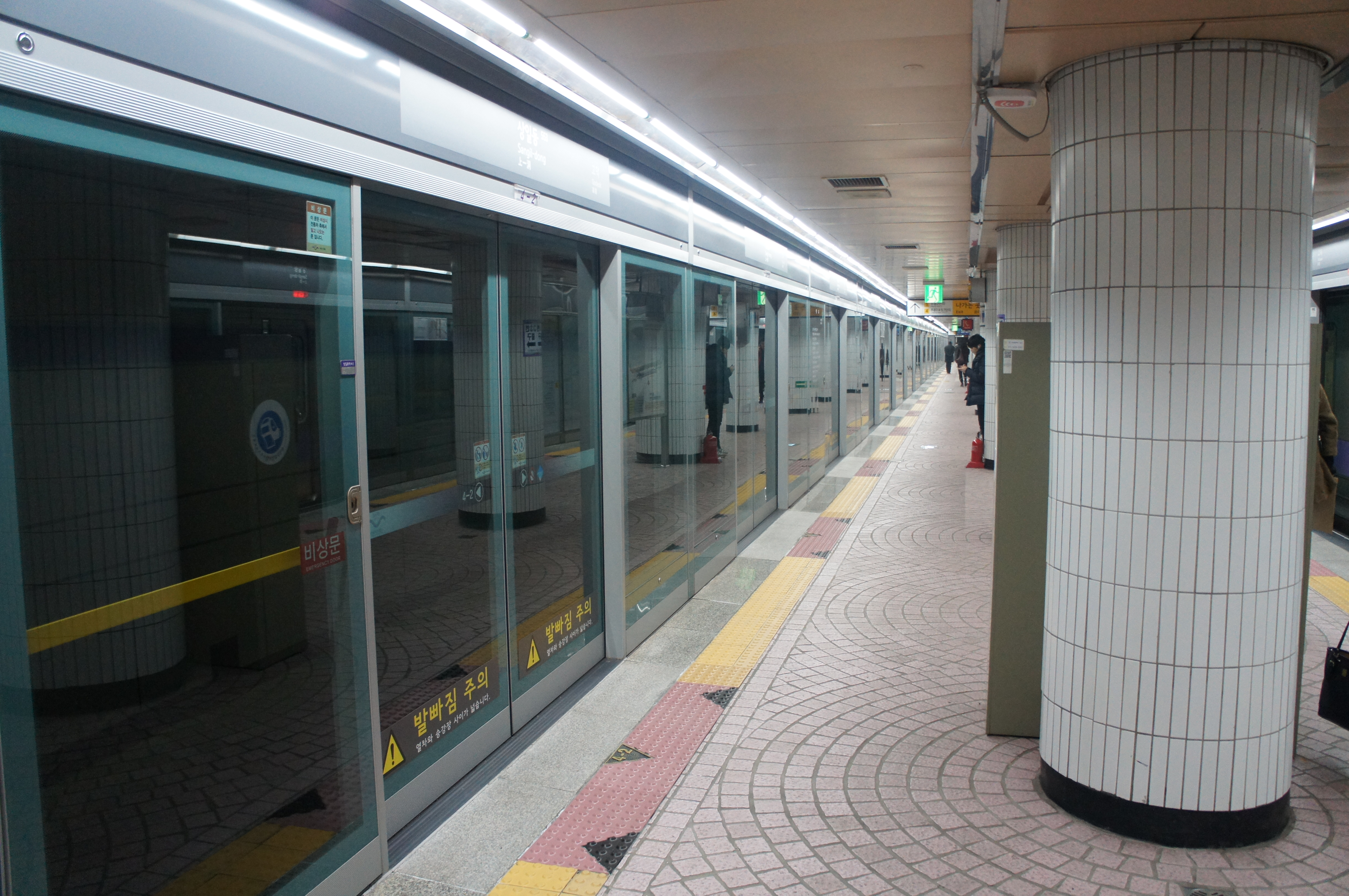 상일동역 승강장